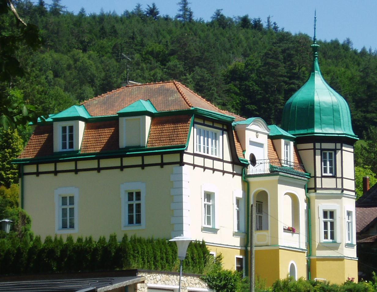 Foto der Villa Adria, einer von elf Neuen Villen in Neuhaus an der Neuen Straße, errichtet von Simon Graf Wimpffen 1911.